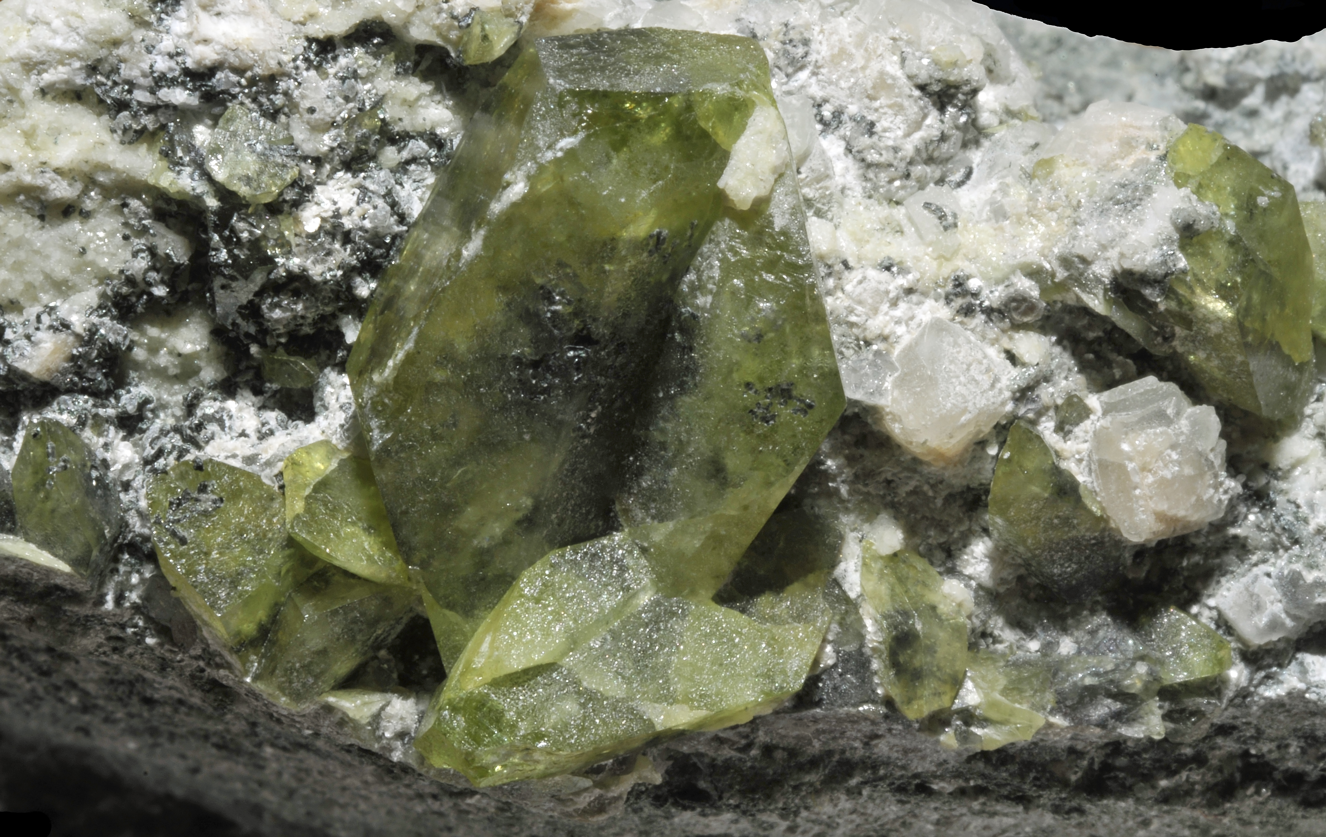 cristaux de titanite (syn. : sphère) : Tormiq valley (Tormic ; Tormik ; Tormig ; Turmiq), Haramosh Mountains, Skardu District, Baltistan, Gilgit-Baltistan (Northern Areas), Pakistan - cristal : 22 mm